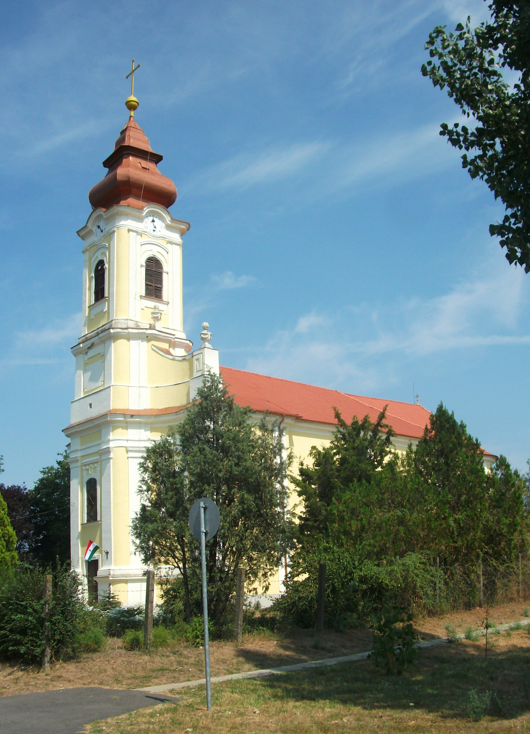 A furtai római katolikus templom délnyugati oldala.